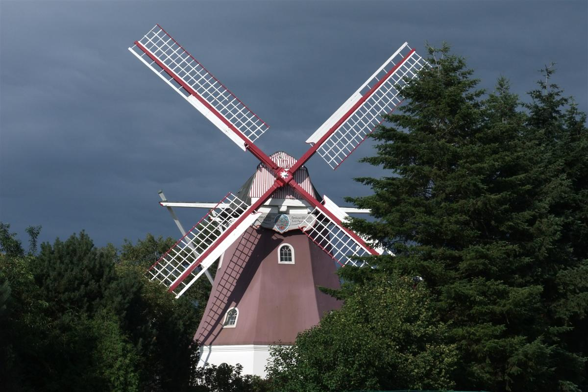 Windmühle von 1880 in Quelkhorn ( Landkreis Verden, Niedersachsen )